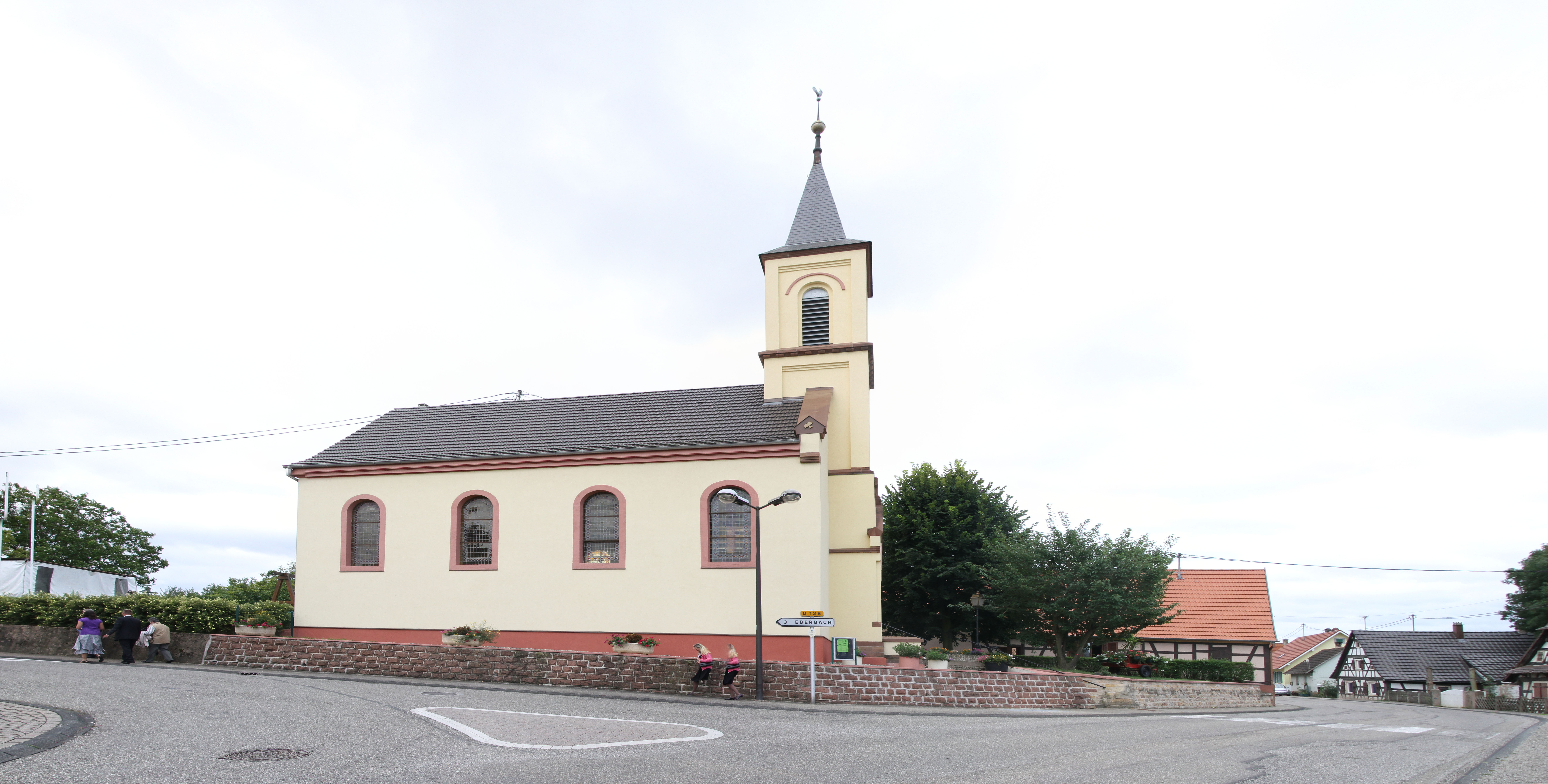 Die Kirche von Kröttweiler.